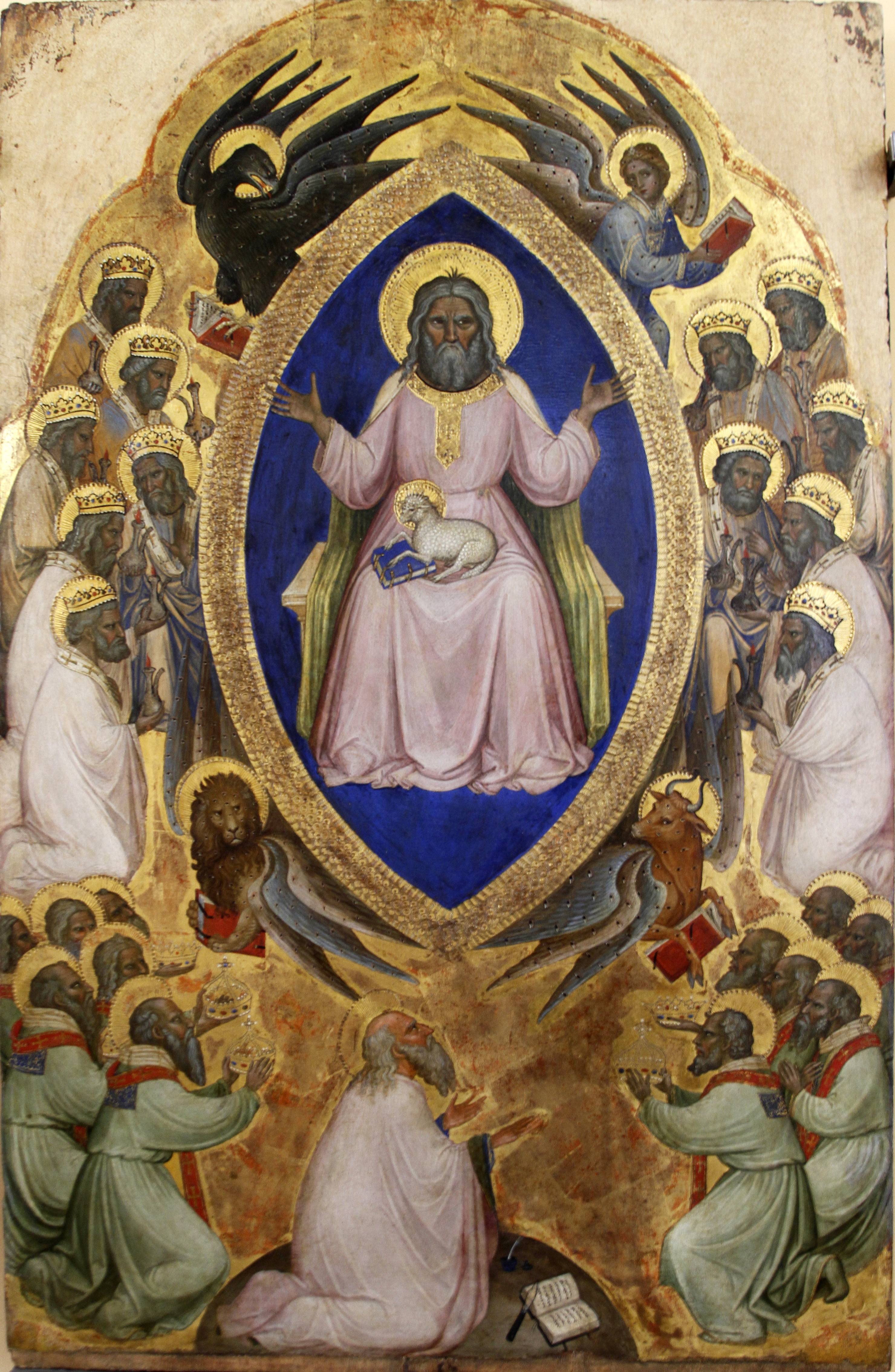 Polyptich of Apocalipse - Accademia - Venice